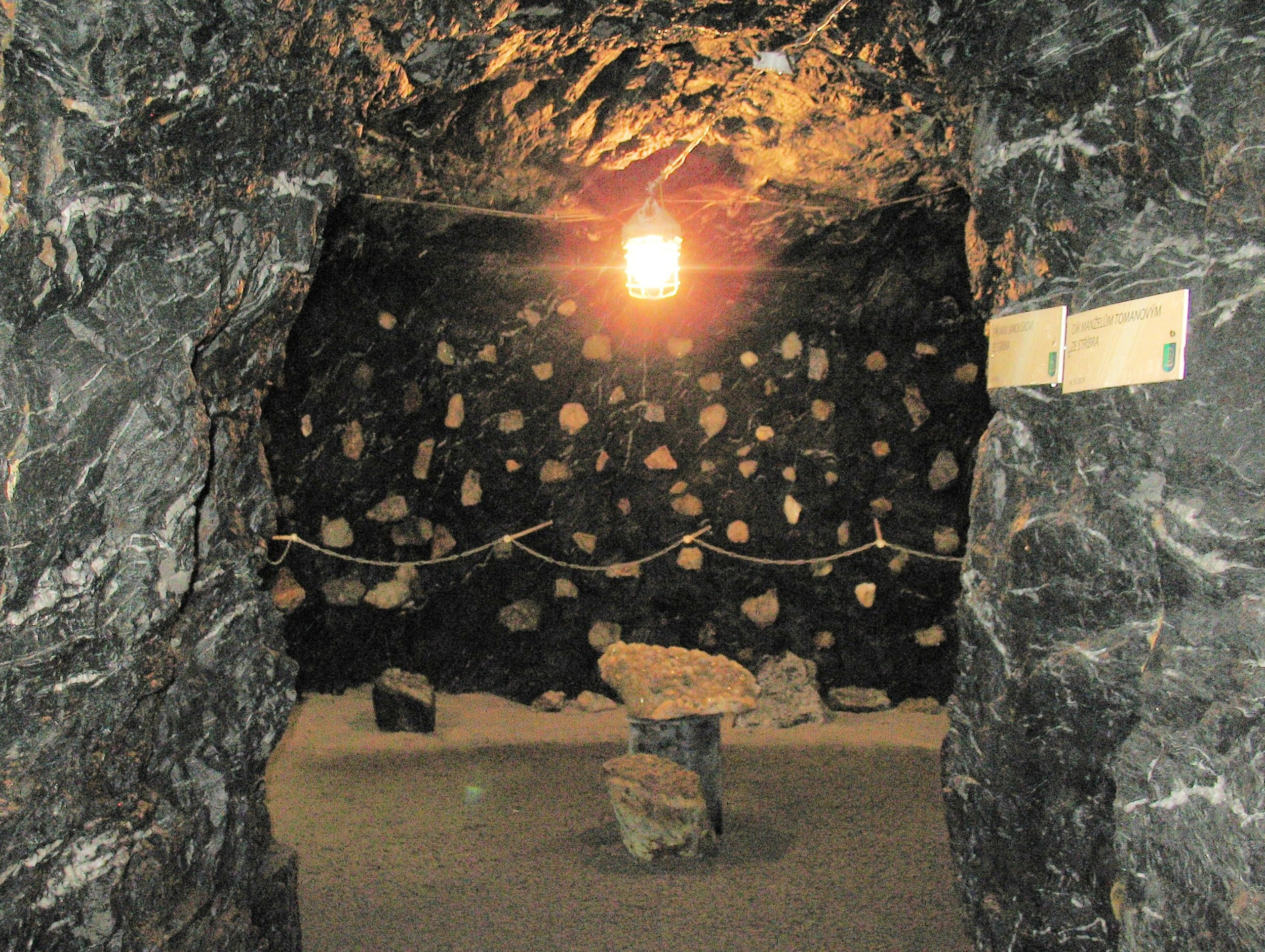 Podzemní sál s mineralogickou expozicí